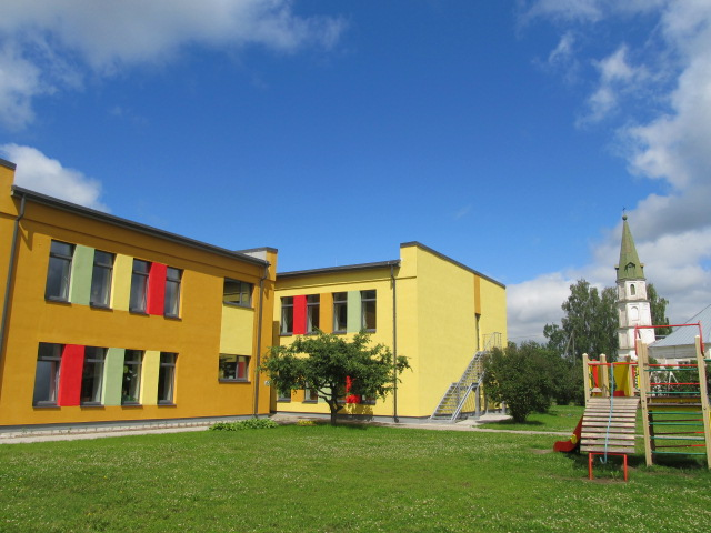 Palsmanes pag. PII